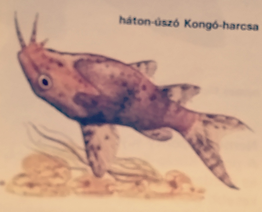 A hátonúszó kongóharcsa a harcsák csoportjába tartozik.